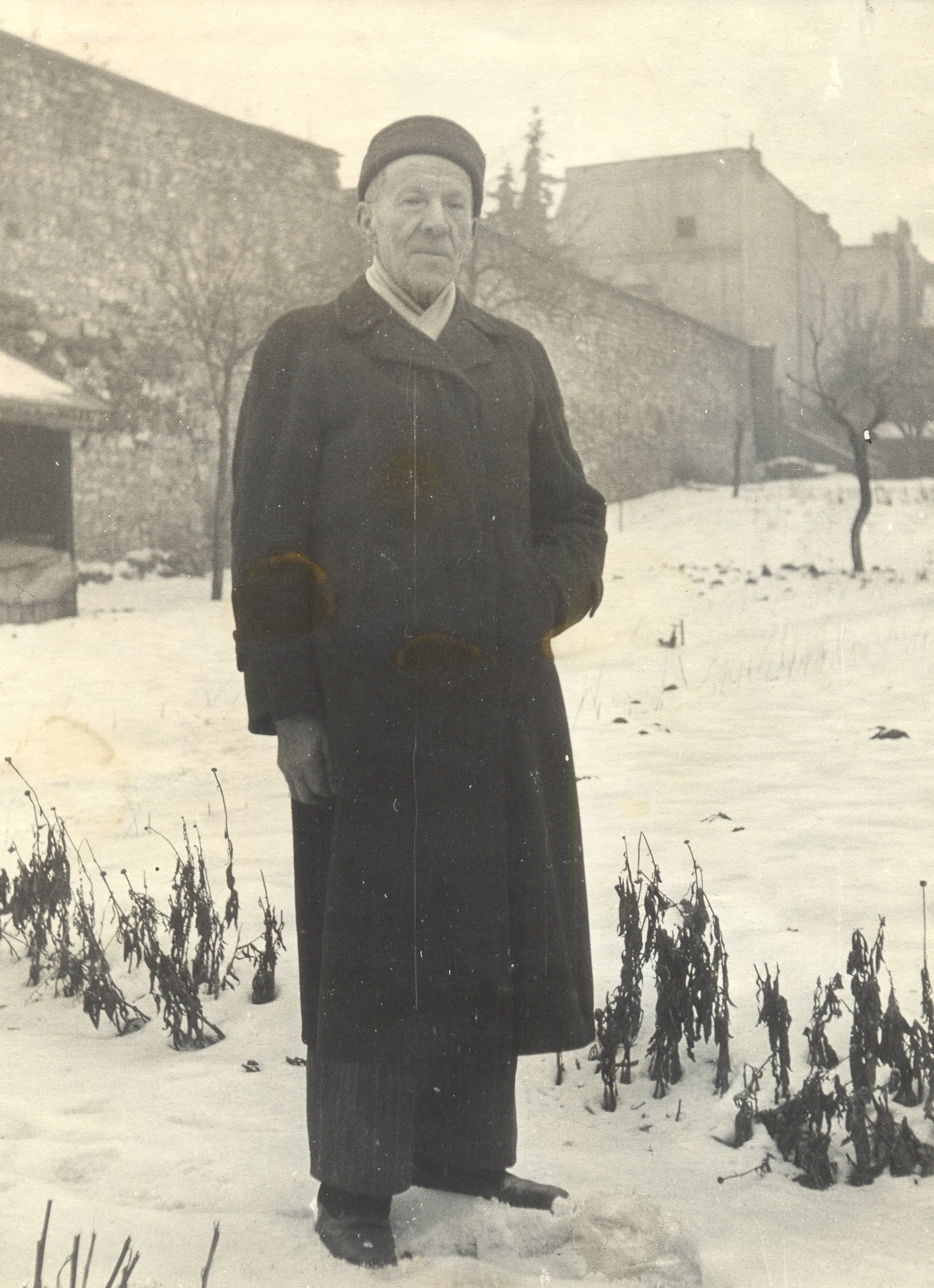 František Marián Červený, terciář 3. řádu sv. Dominika, kostelník od sv. Jakuba v Litoměřicích v 60. letech 20. století.